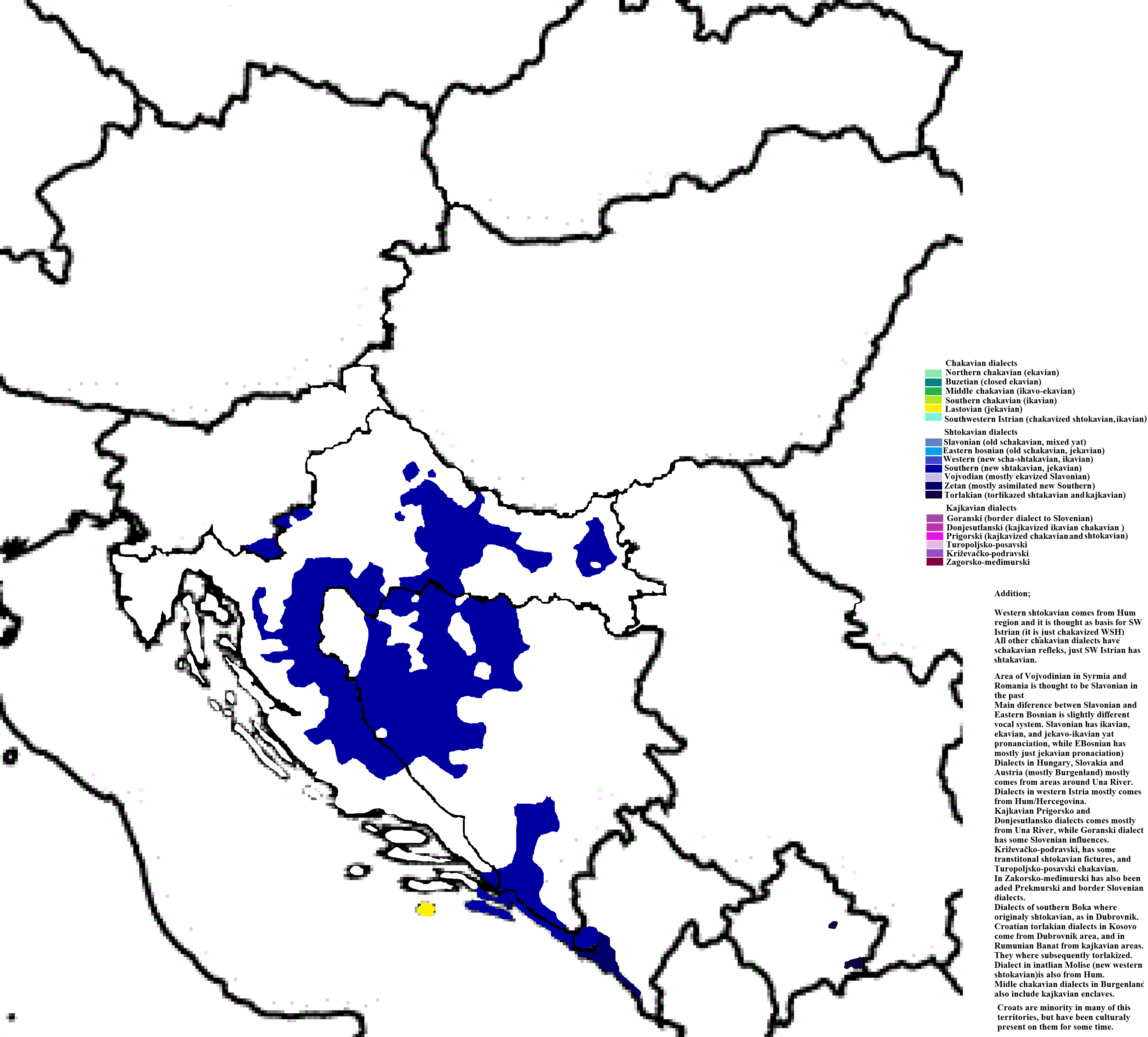 Novoštokavski jekavski i povezani dijalekti (čakavski jekavski na lastovu i asimilirani dijalekti (zetski u Boki, torlački na Kosovu, Srbiji i Rumunjskoj))